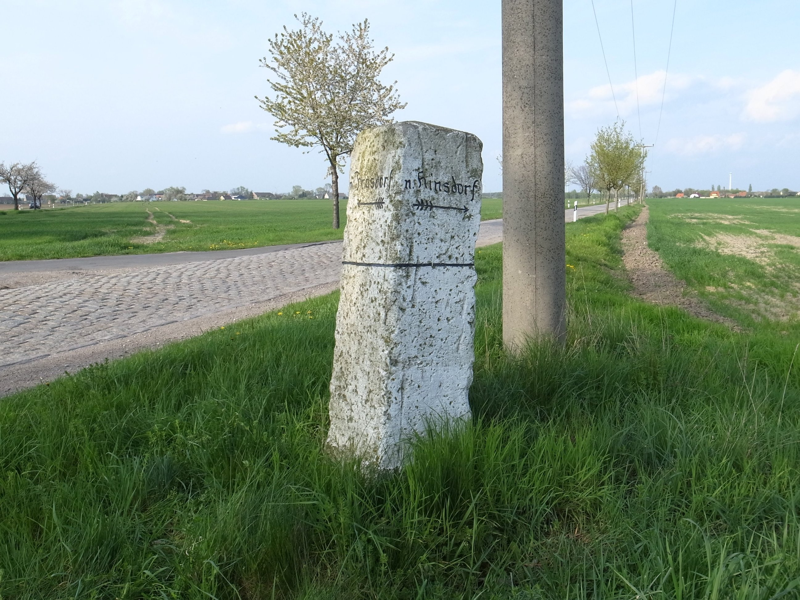 Meilendorf, Wegweiser. Inschrift: n Frasdorf n.Hinsdorf